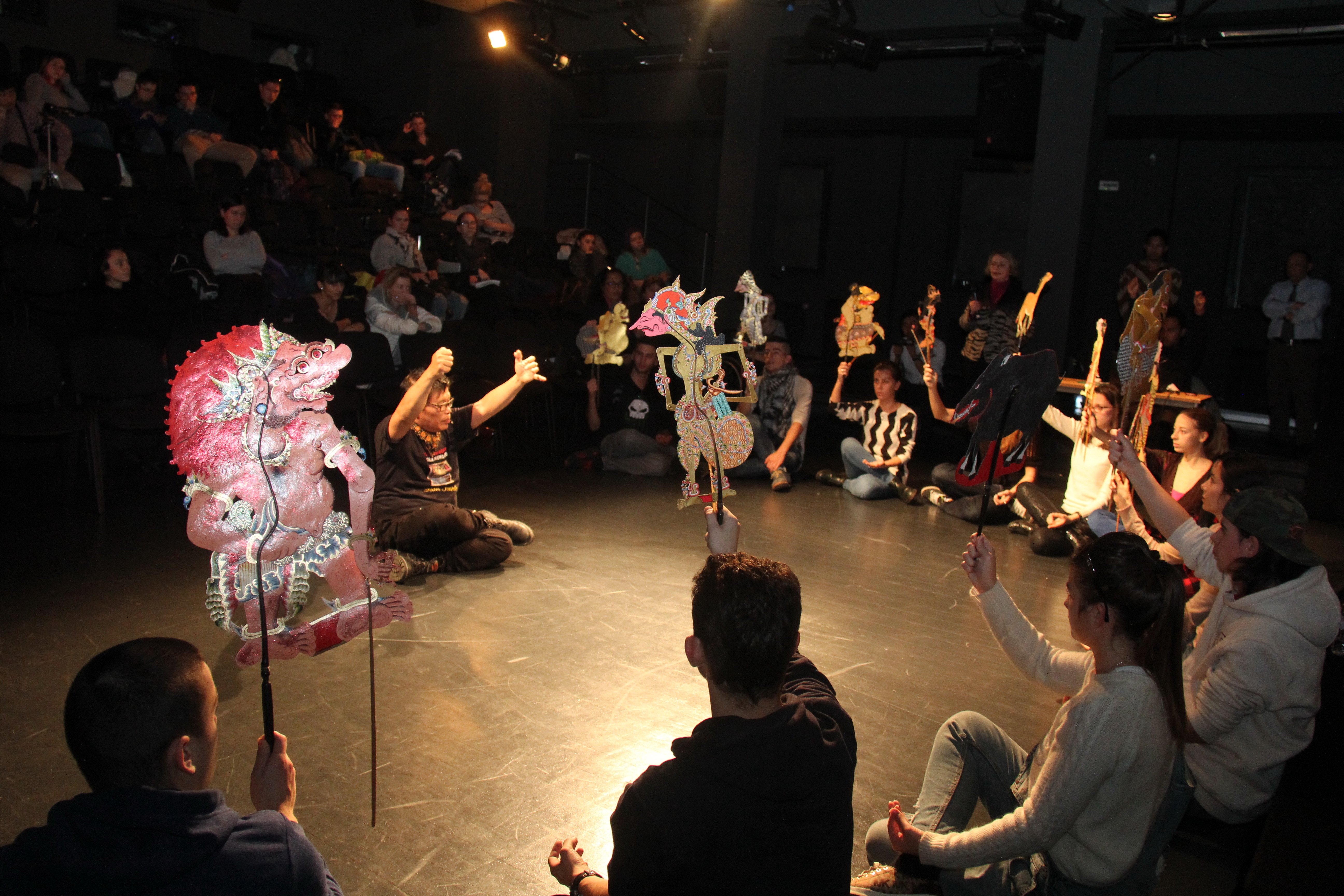 Visiting Lecturer di National Academy of Theater and Film Art